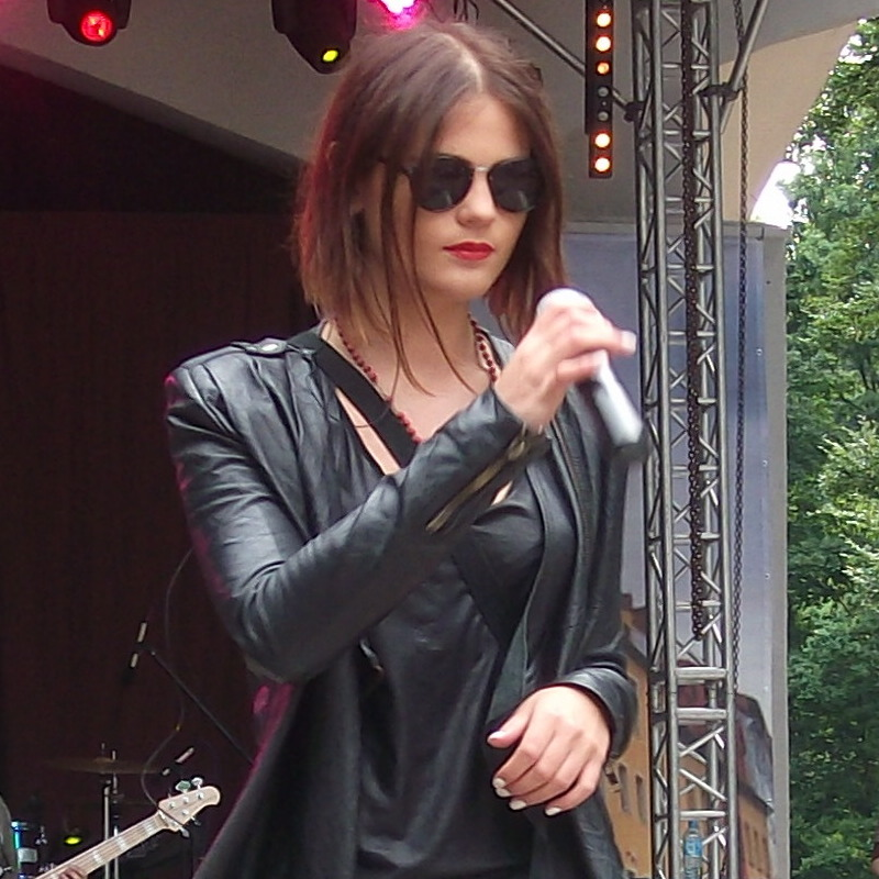 Honorata "Honey" Skarbek podczas Dni Zgorzelca 2013